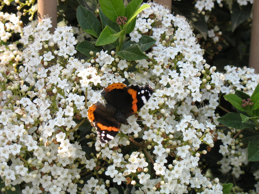 נמפית הסרפד על גבי מורן החורש רישיון נוצר על ידי משתמש:Ymm